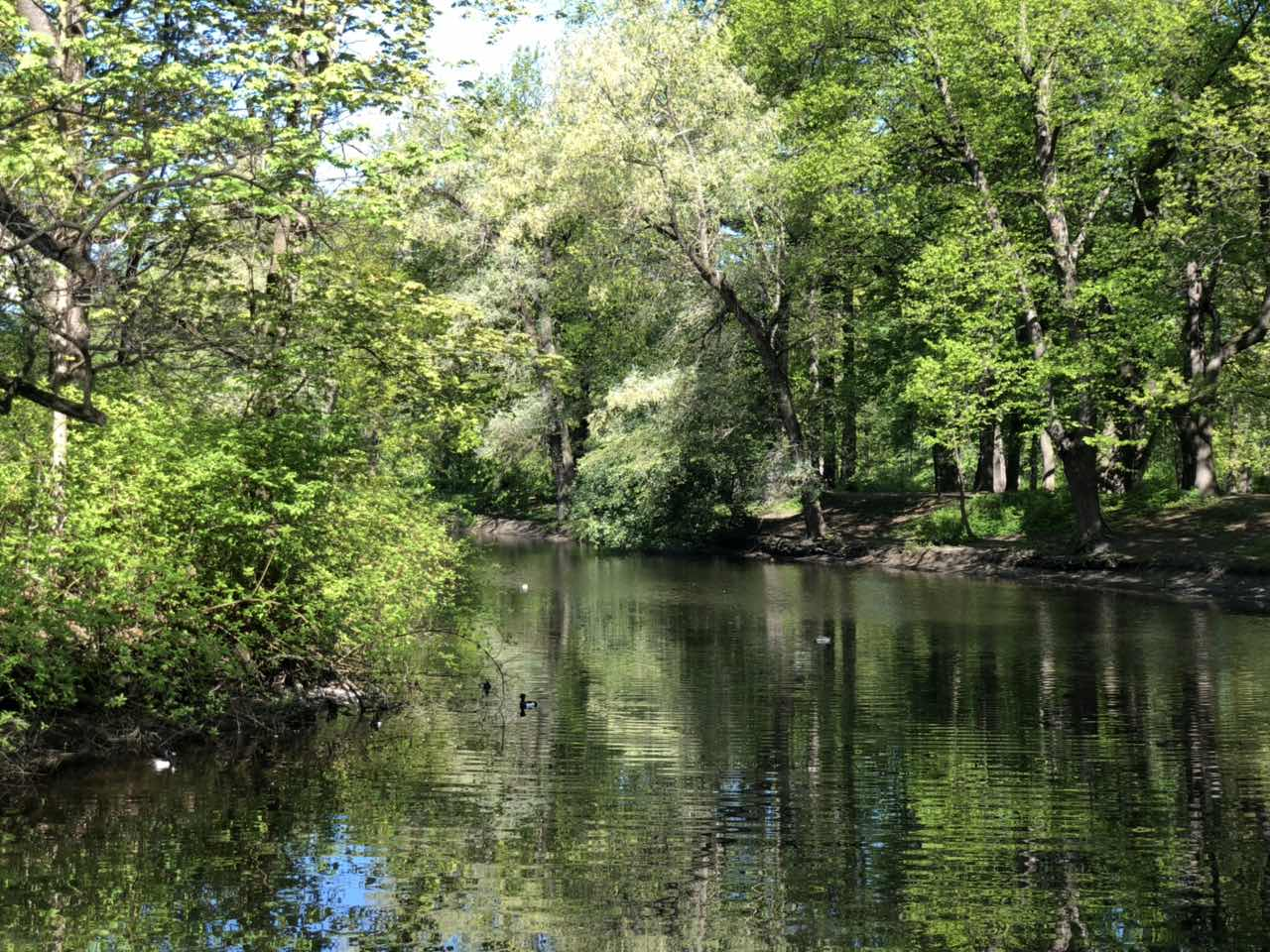 Пруд на Елагином острове